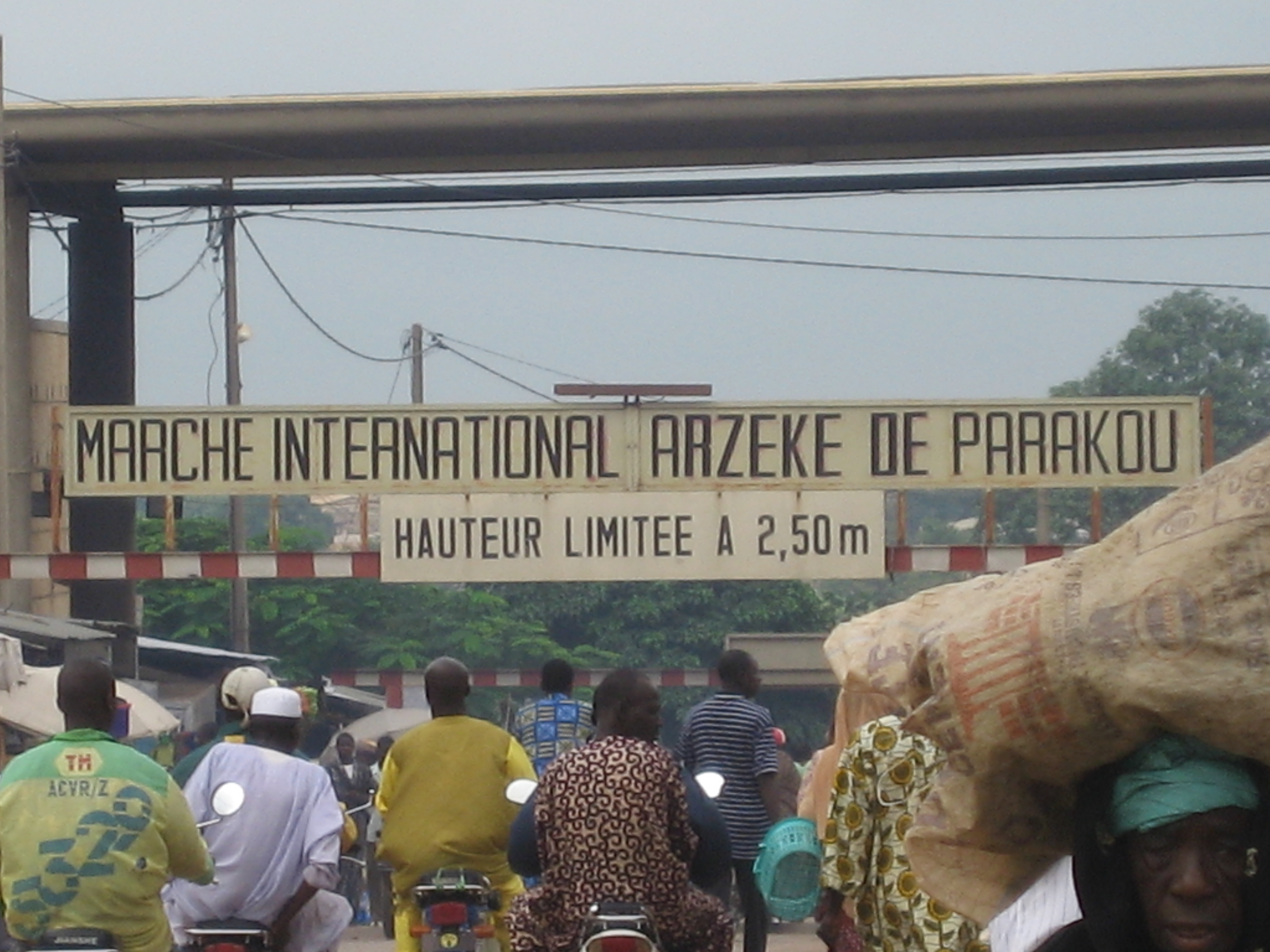 Parakou, Benin